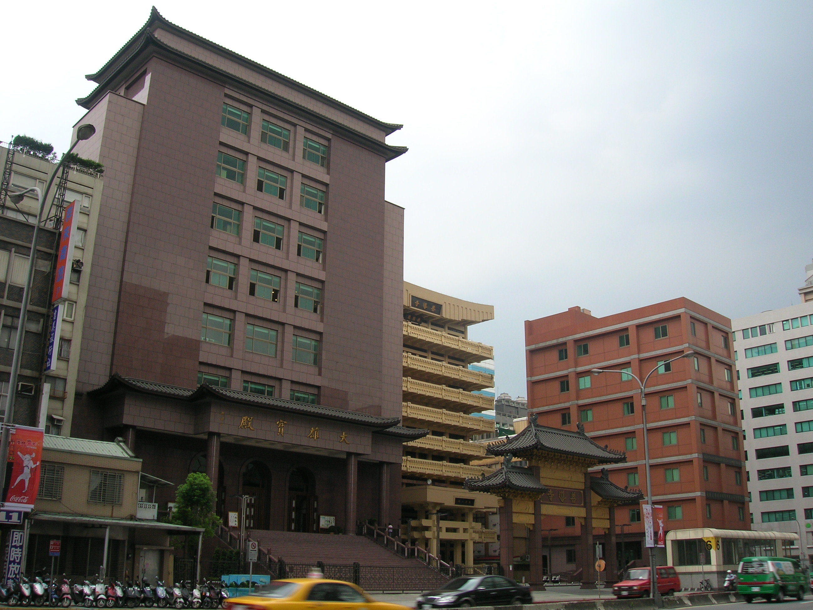 臺北市善導寺正面。